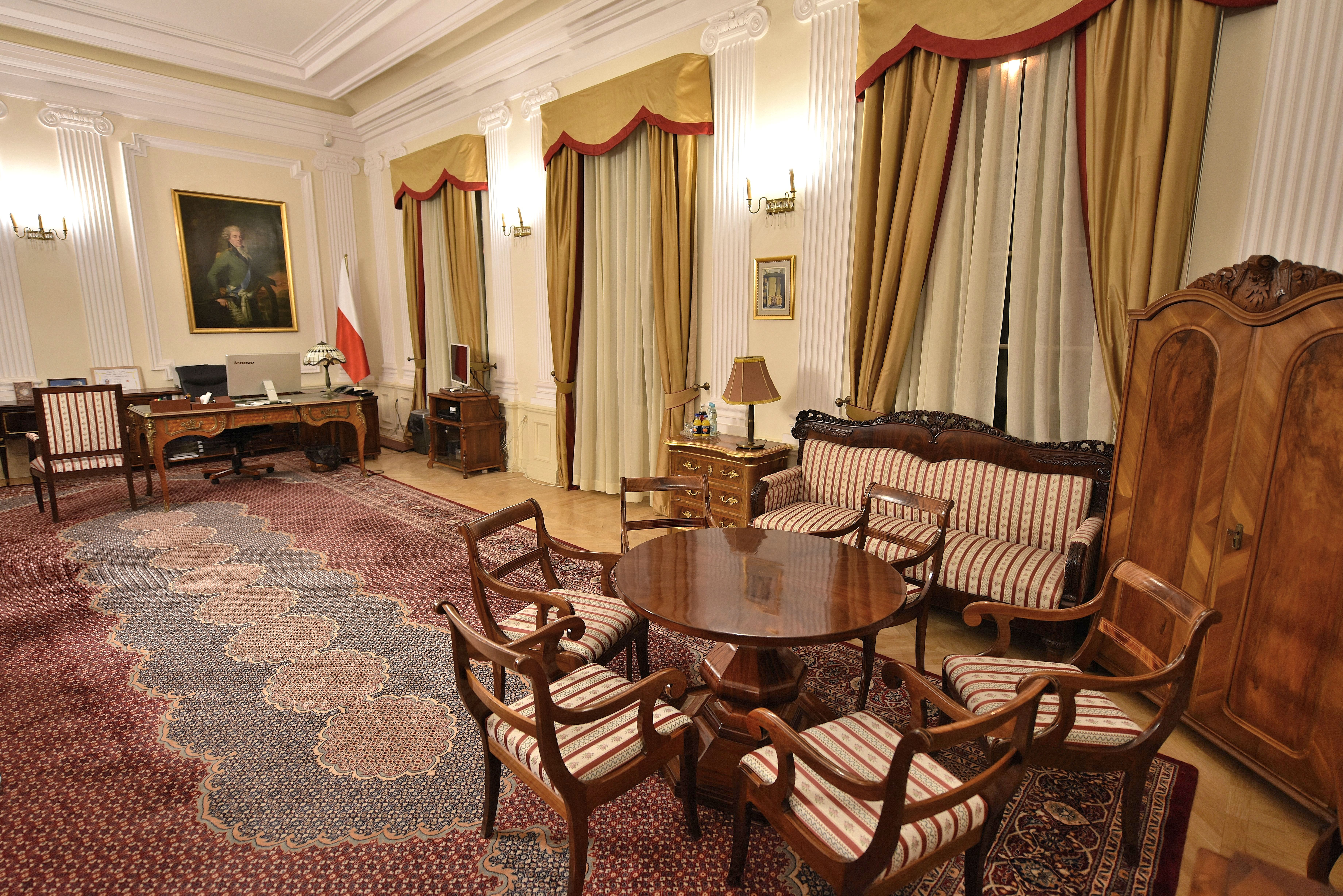 Gabinet ministra w pałacu Potockich w Warszawie